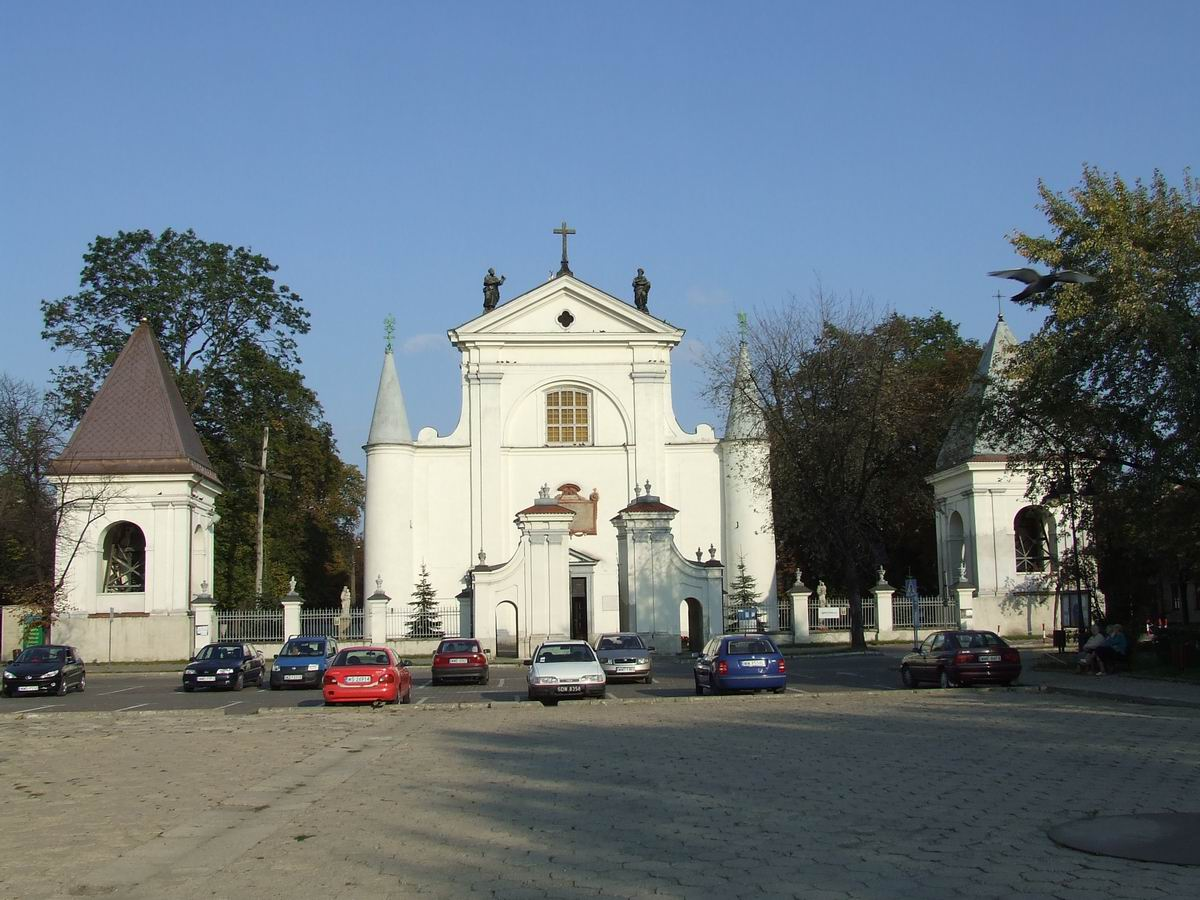 Kościół farny w Węgrowie